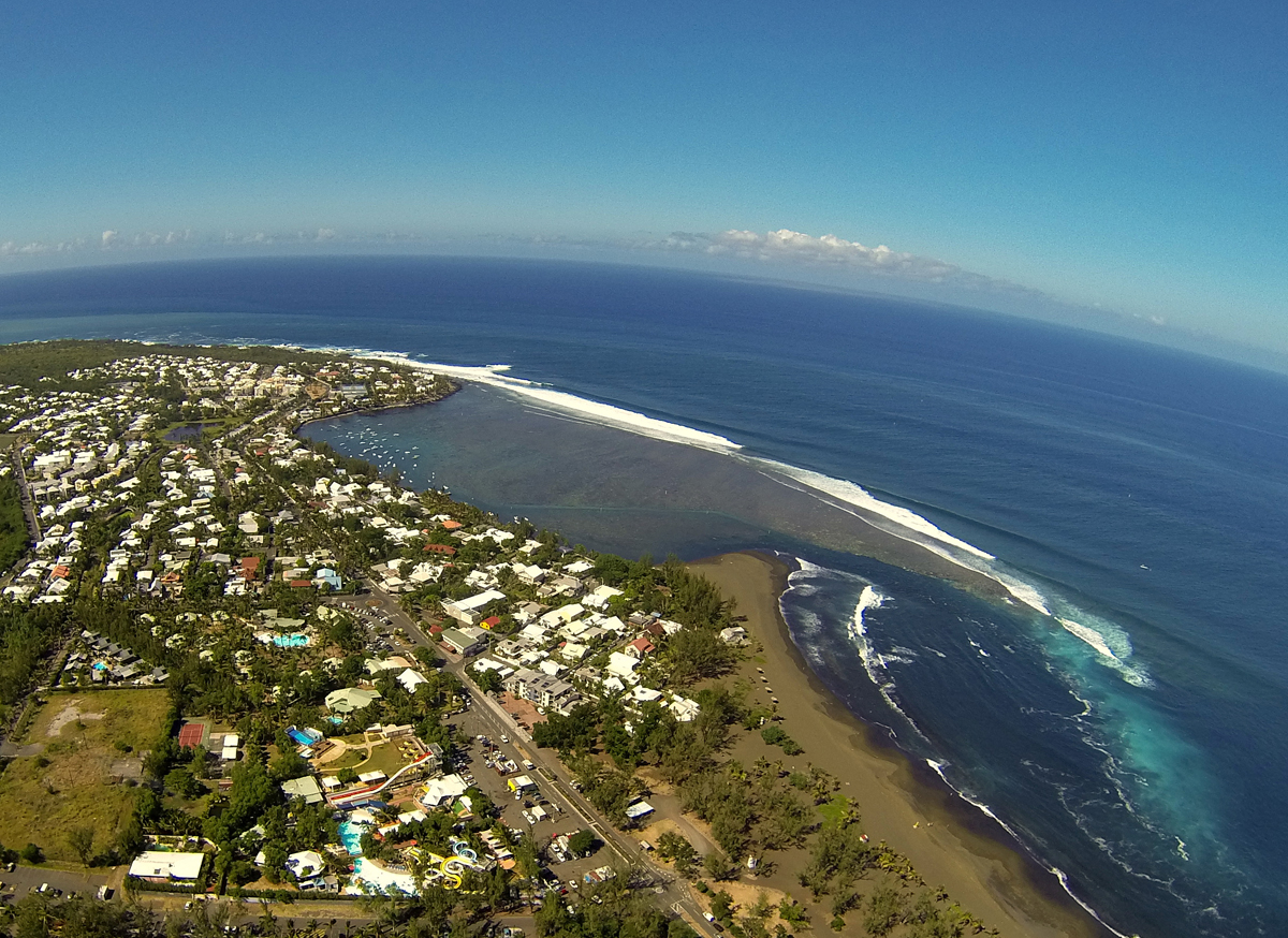 Photographie aérienne du lagon de l'Etang-salé à la Réunion (photo Alexandre Haffner, La Réunion vue du ciel).